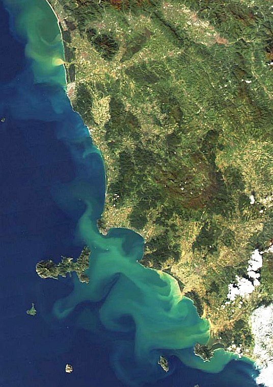 I detriti fluviali ben visibili in mare aperto il giorno dopo la conclusione dell'evento atmosferico che ha causato l'alluvione - Fonte NASA